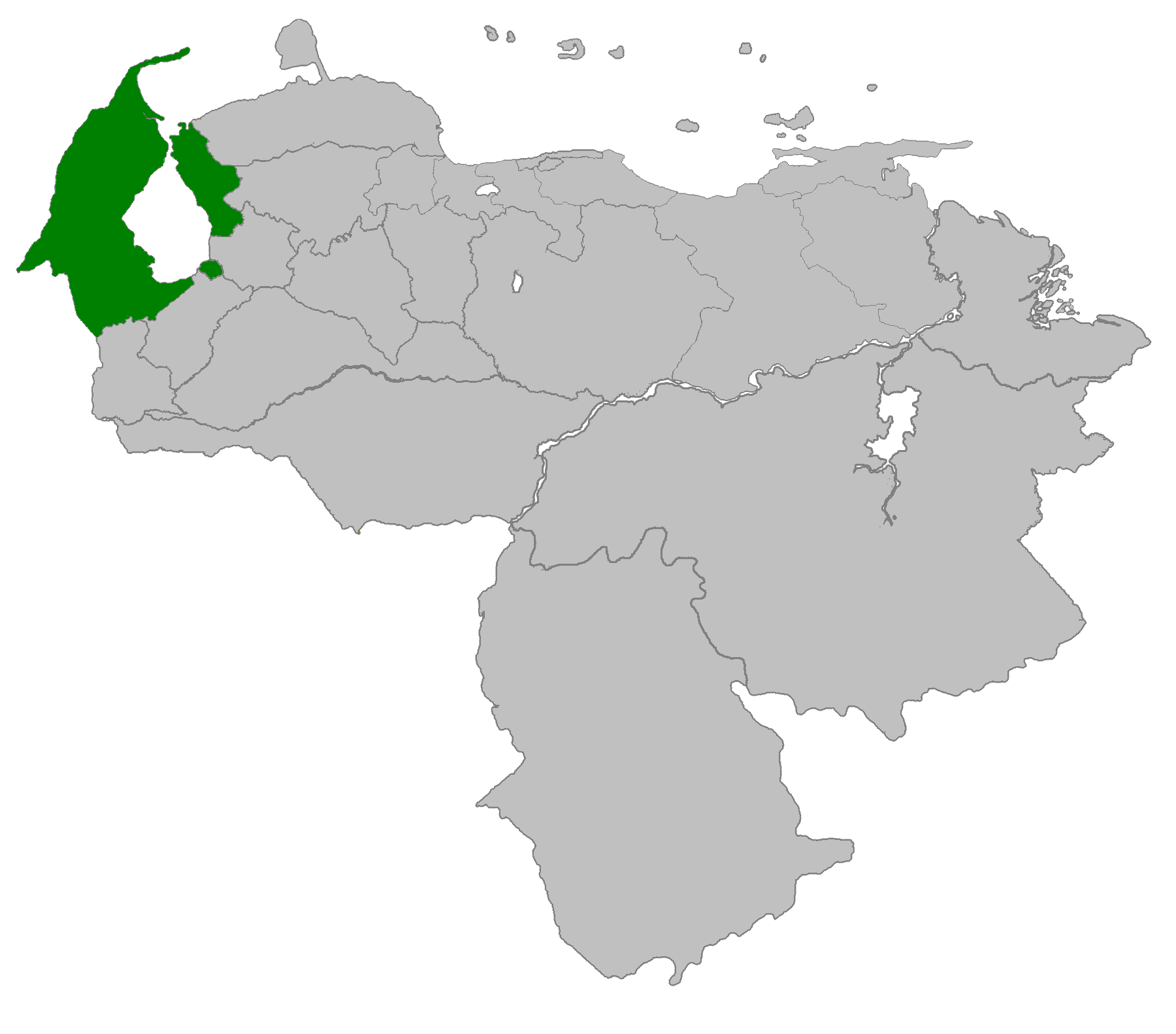 Estado Zulia actual